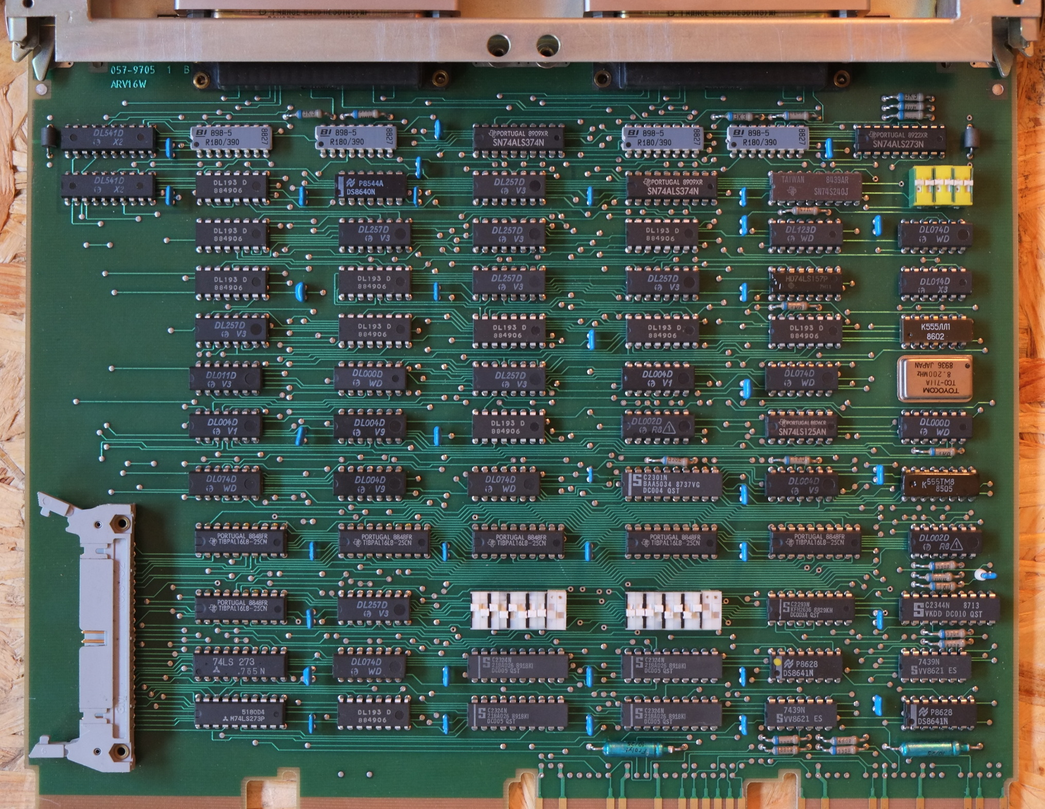 DMA-Controller einer K1822